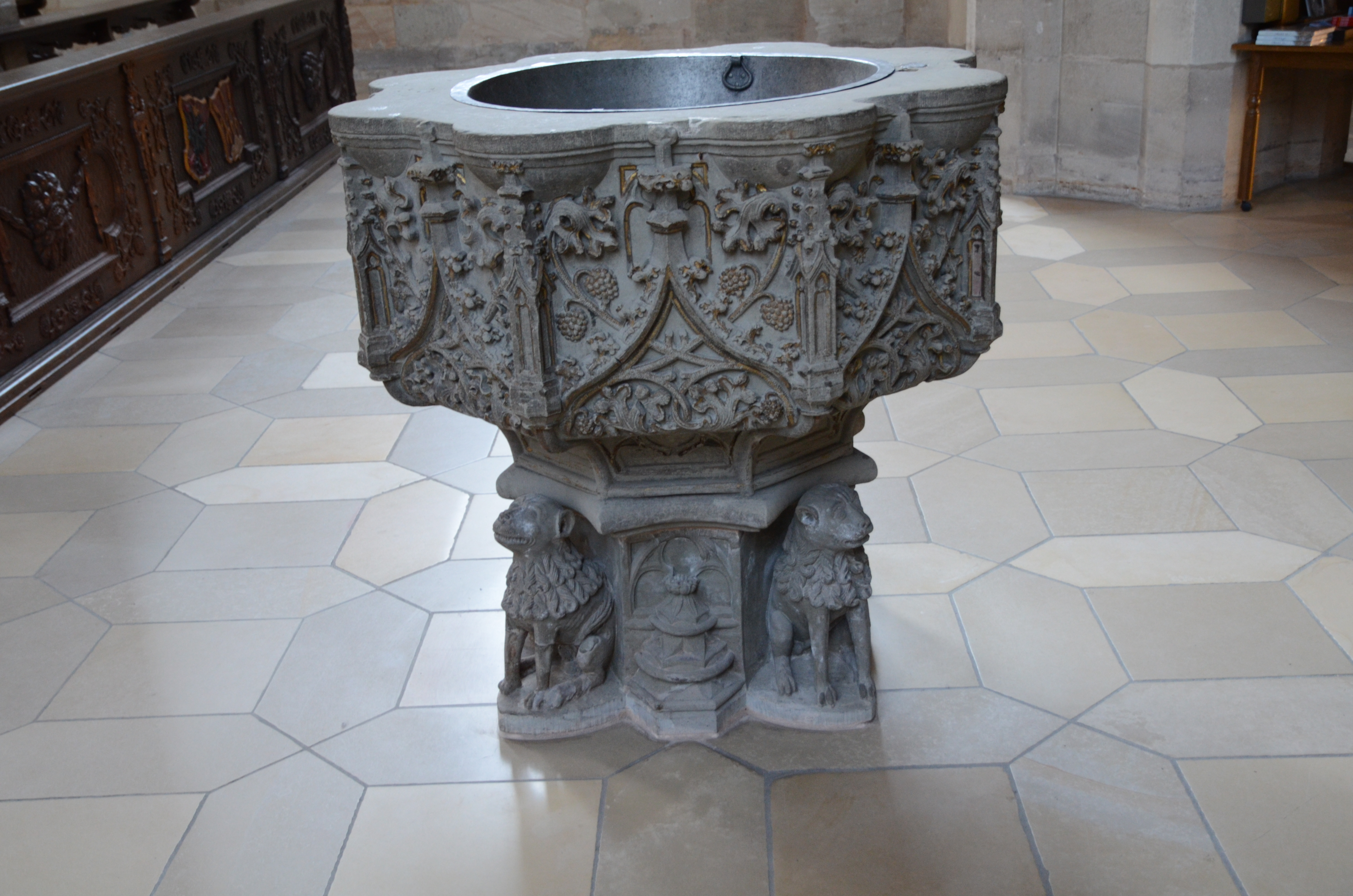 Dinkelsbühl Münster St. Georg, Taufbecken